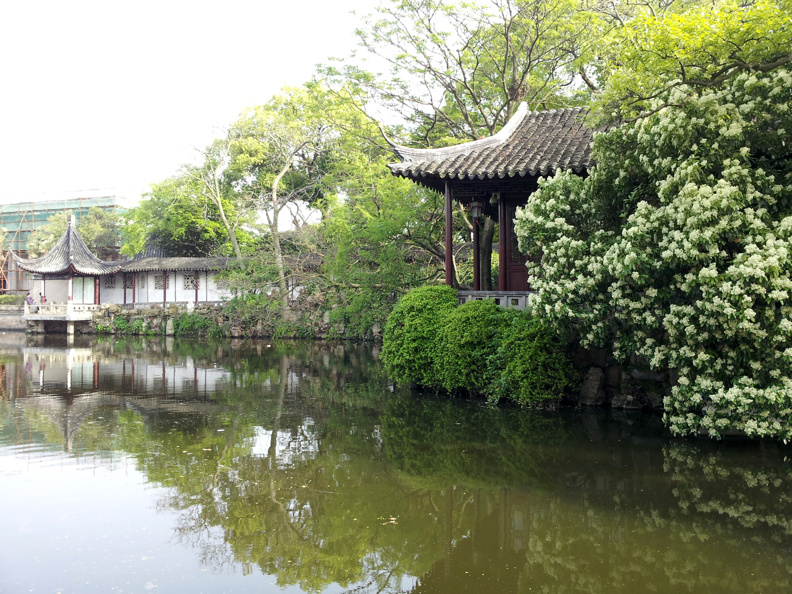 中文（中国大陆）: 苏州 沧浪亭